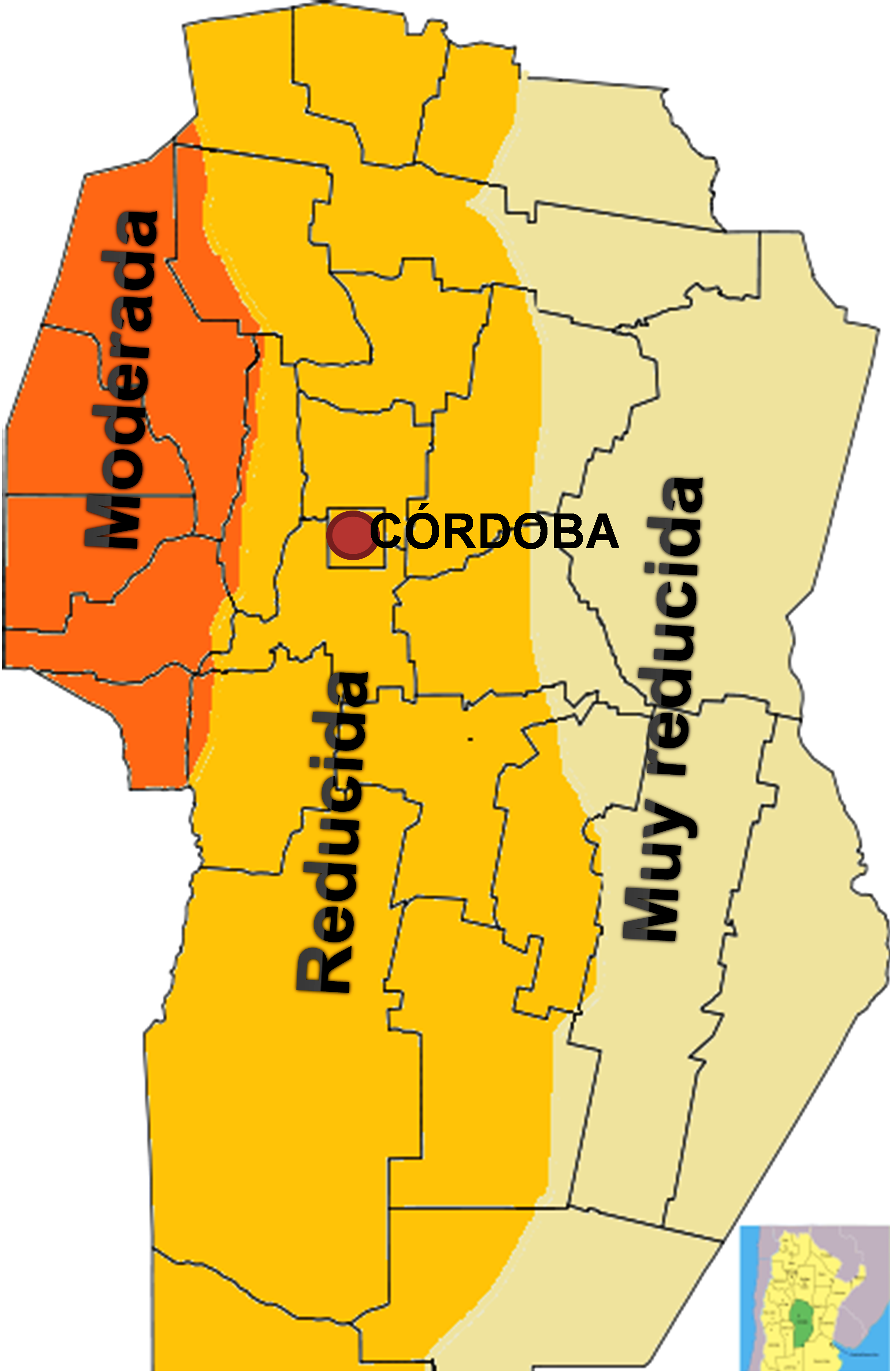 División de las zonas sísmicas de la provincia de Córdoba.